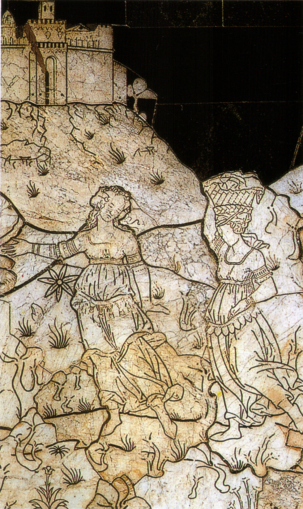 Pavimento di siena, storie di giuditta (francesco di giorgio)